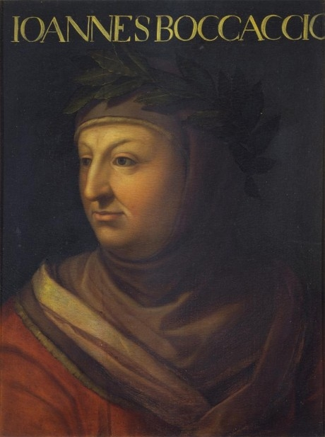 Giovanni Boccaccio